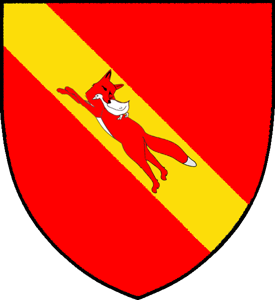 Vapensköld för svenska adelsätten Rääf i Finland